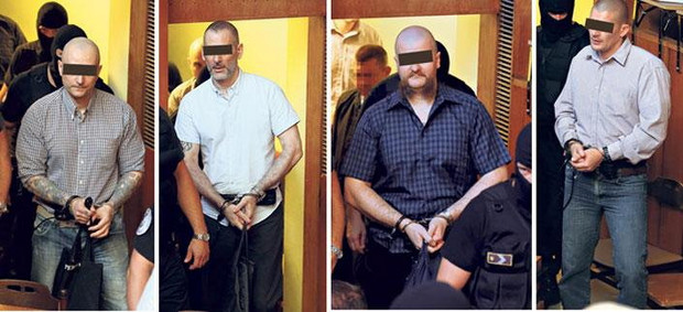 Romagyilkosságok elkövetői